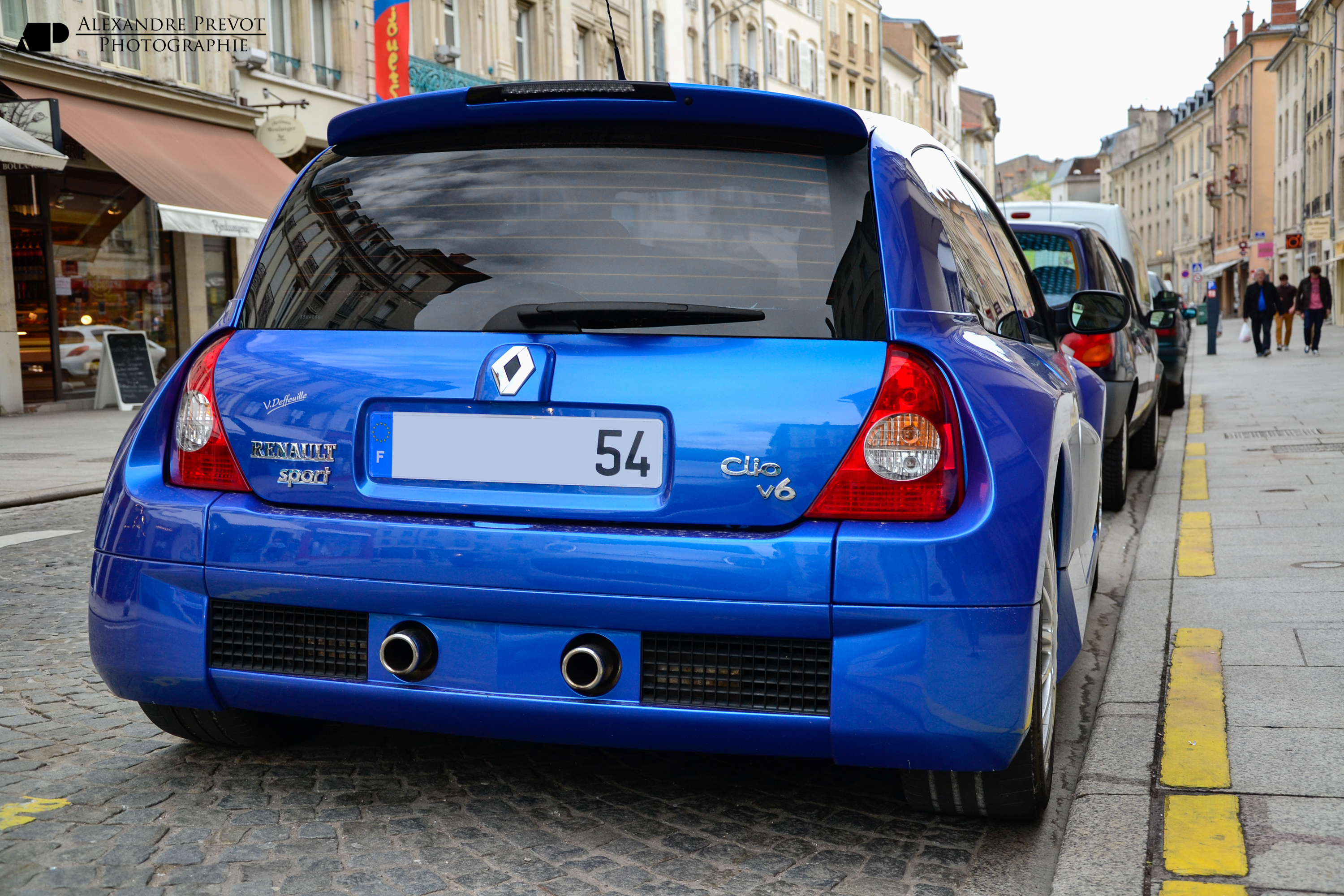 Renault Clio Sport V6